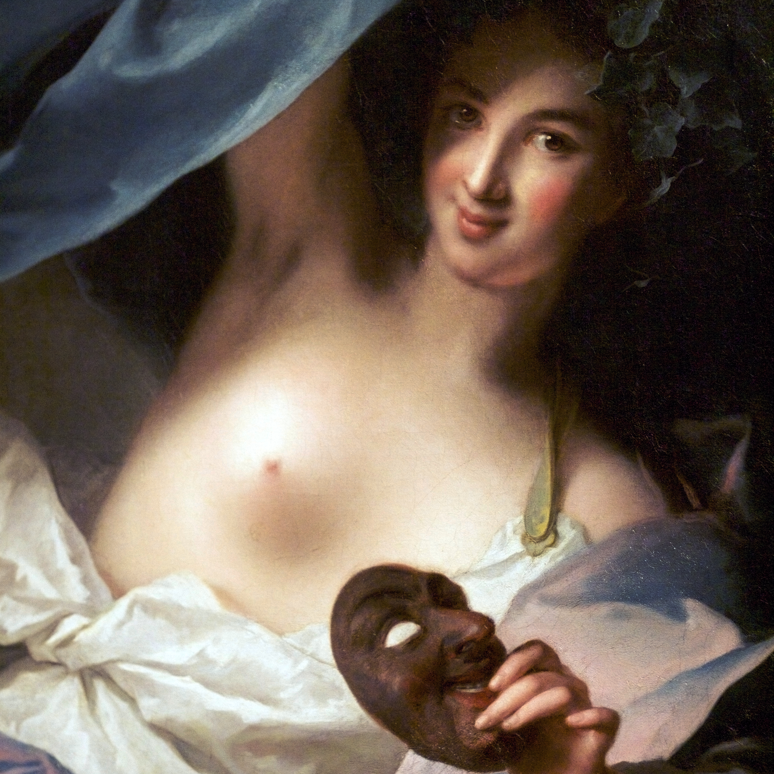 Détail de la peinture de Jean-Marc Nattier : Thalie, muse de la comédie.